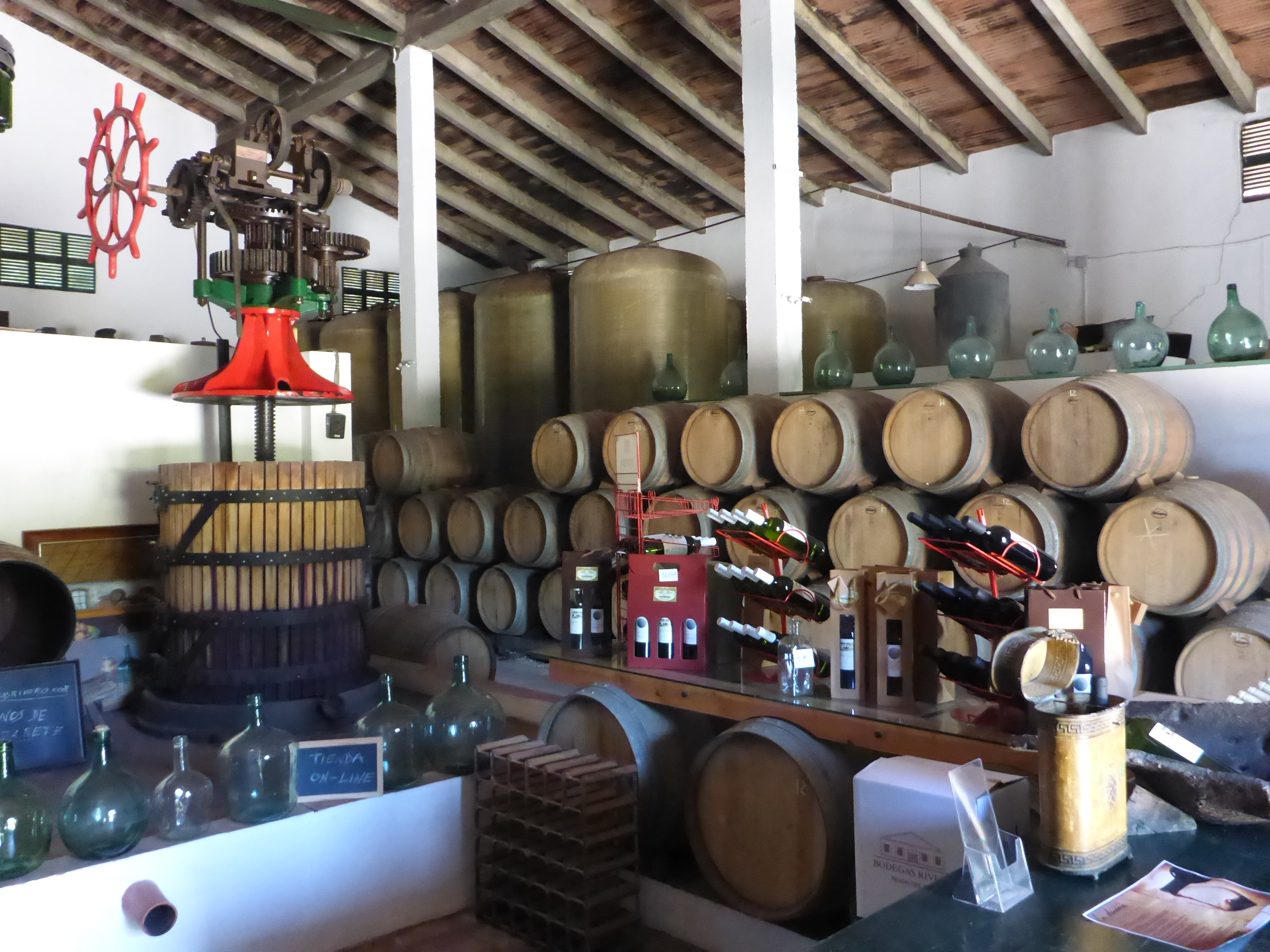 Bodegas Rivero en Prado del Rey, Andalucía (España)